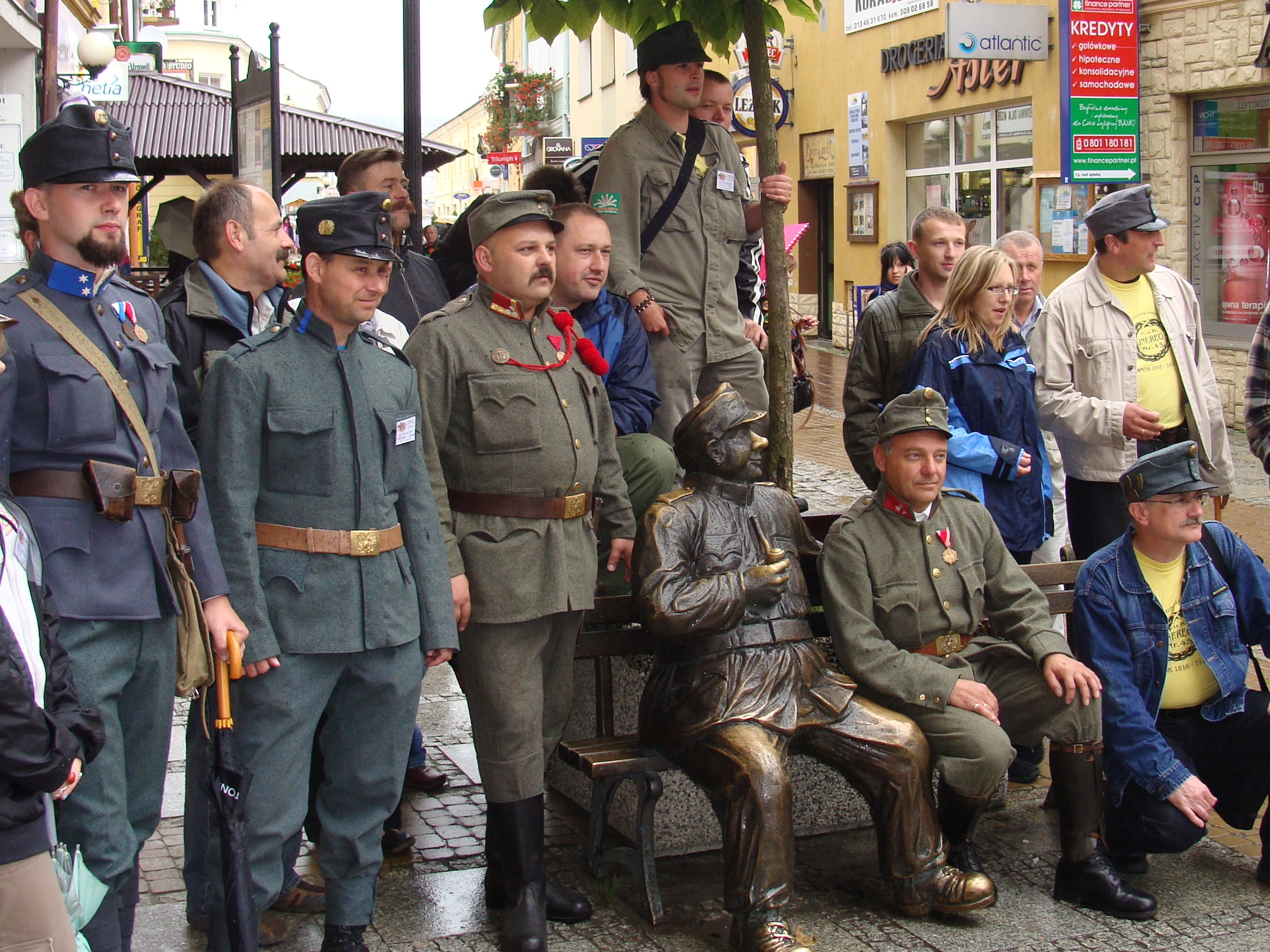 IV Sanockie spotkanie Miłośników Austro-Węgier